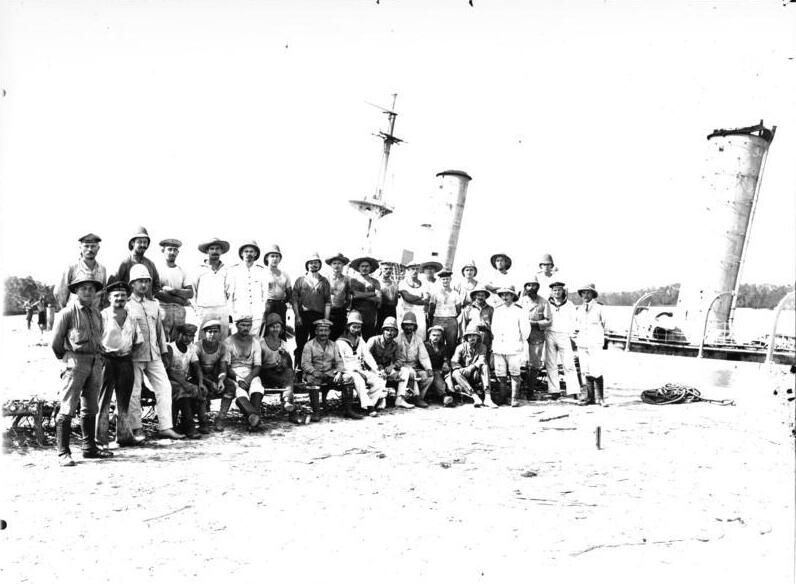 Zum Photo aufgestellt vor der "Königsberg"